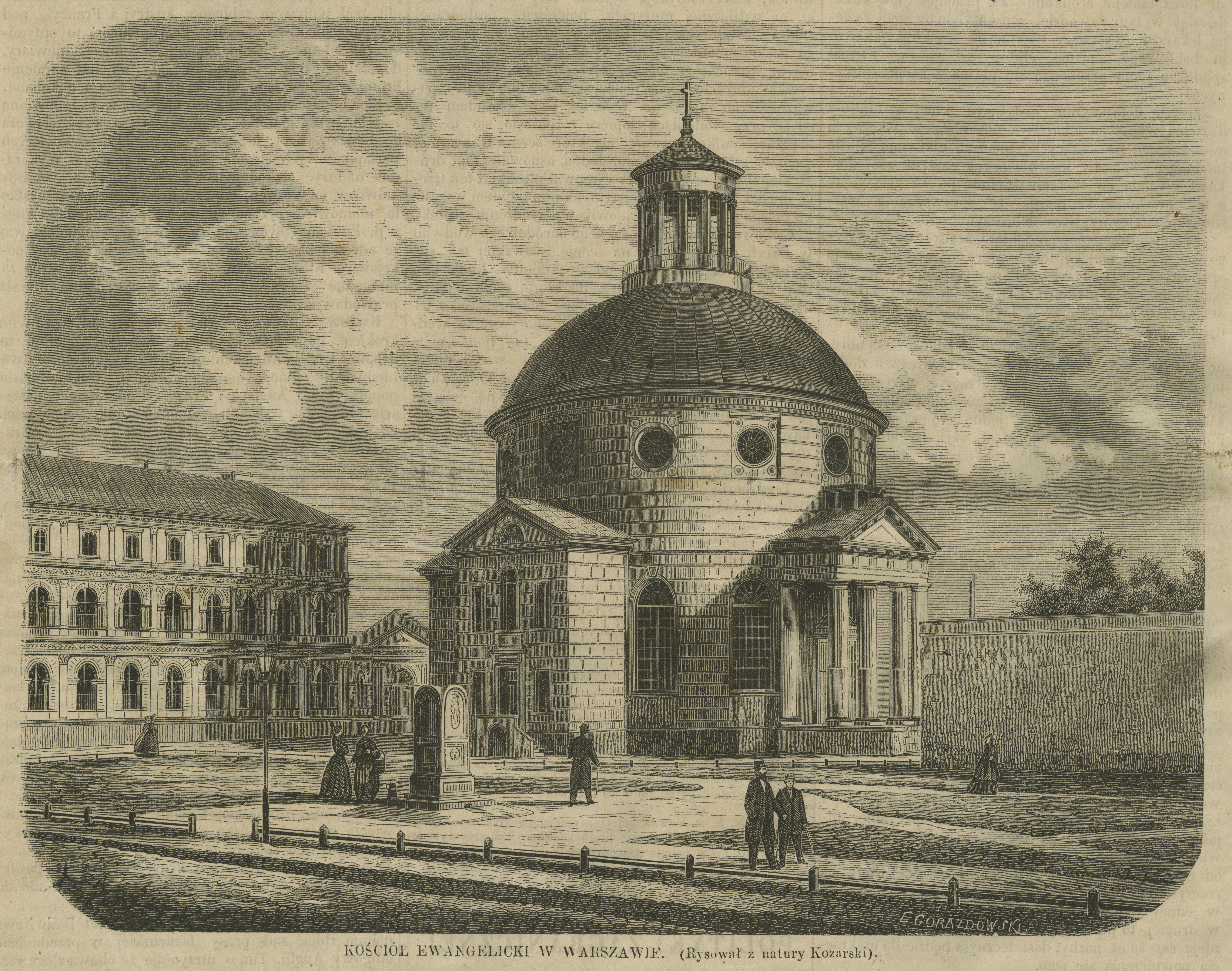 Kościół ewangelicki w Warszawie